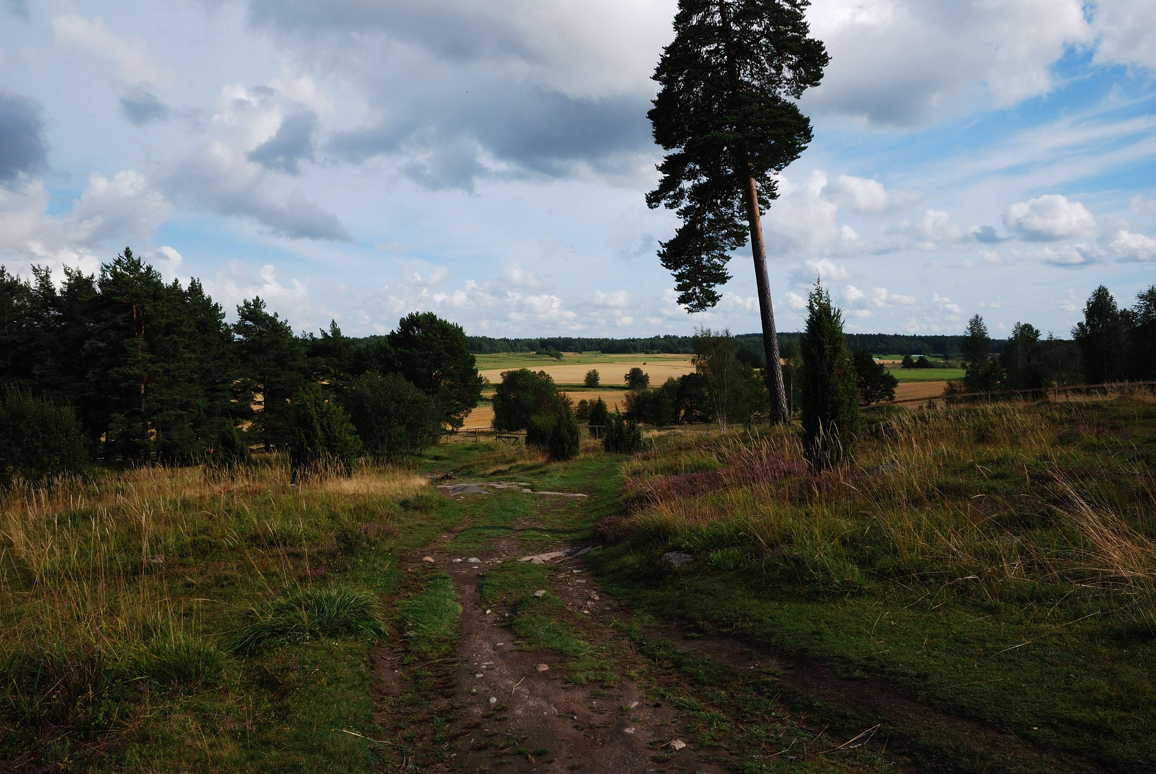 Fårhage vid Hågahögen, Uppsala.